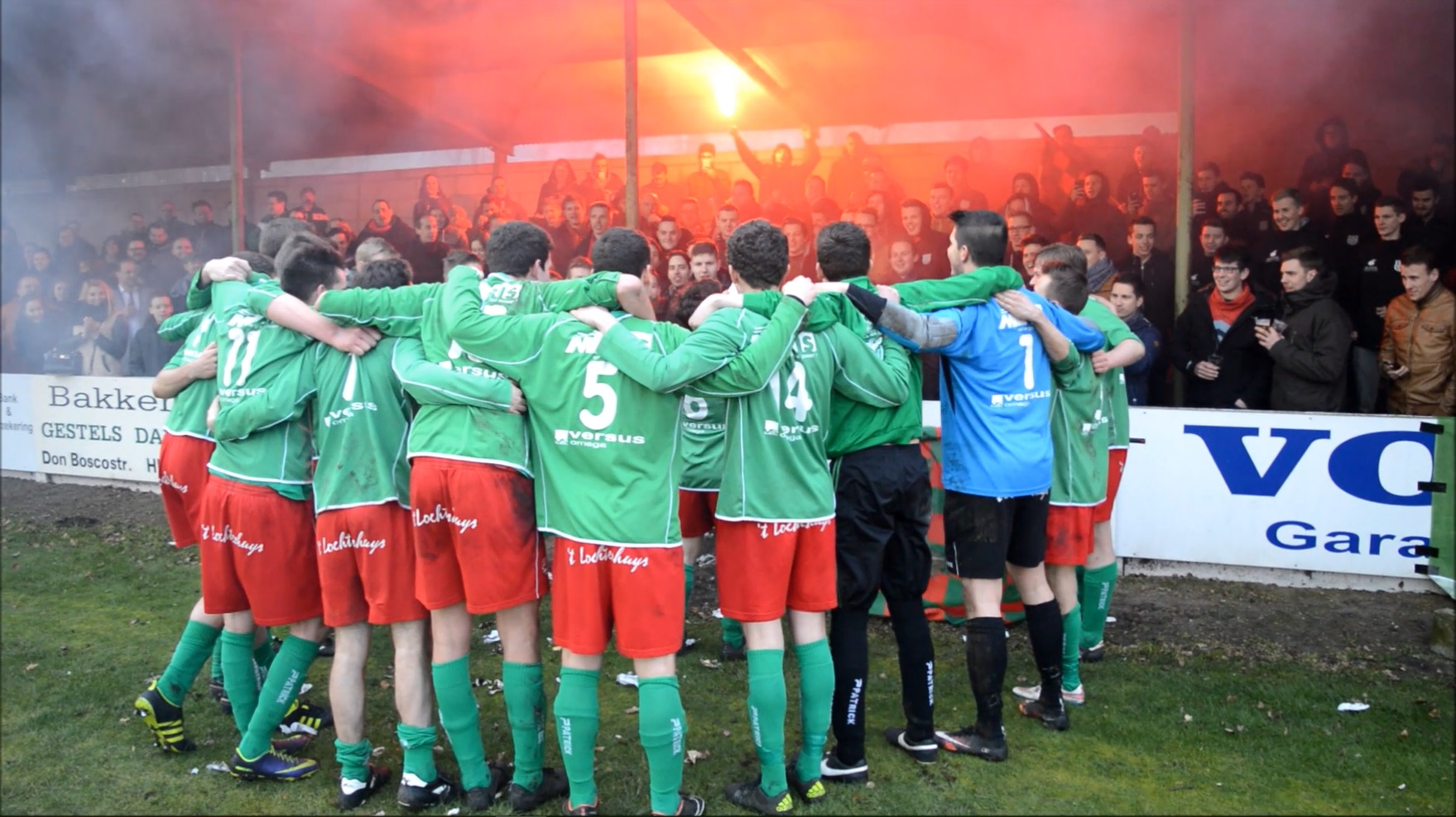 De Ekselspelers en aanhang vieren de derby-zege in en tegen Hechtel.